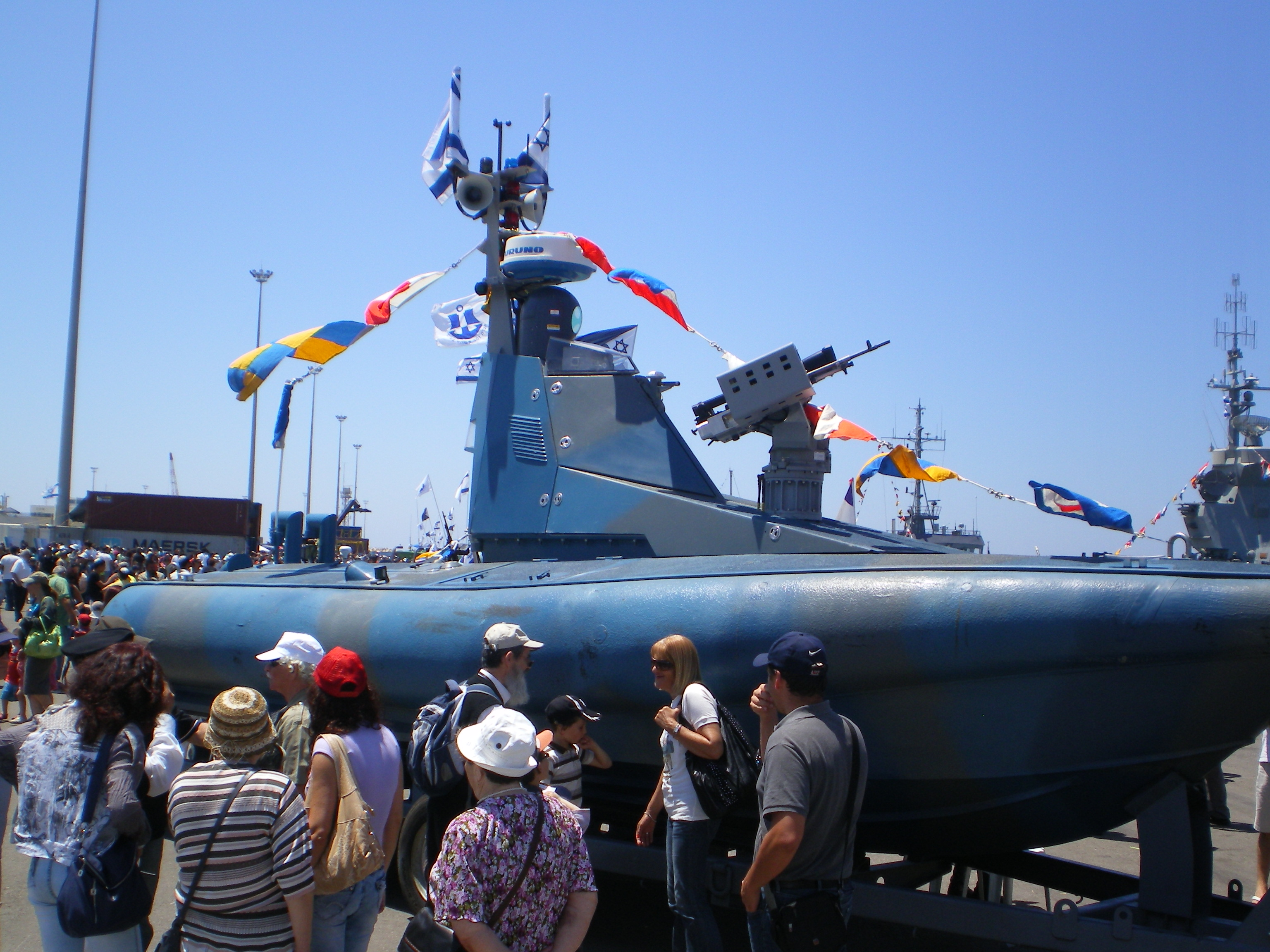 פרוטקטור